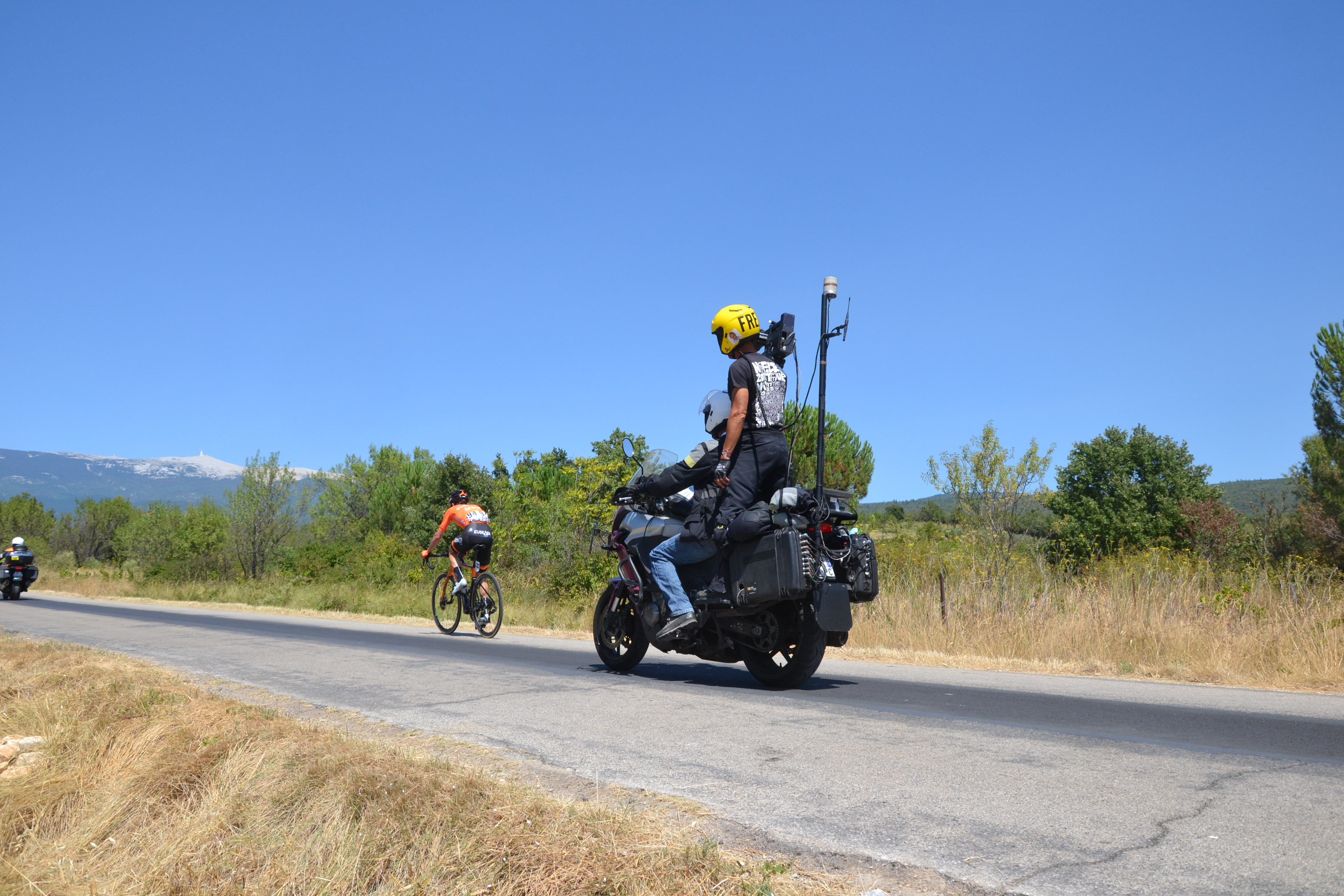 2e passage de la course entre Villes sur Auzon et Flassan échapée de Garikoitz Bravo